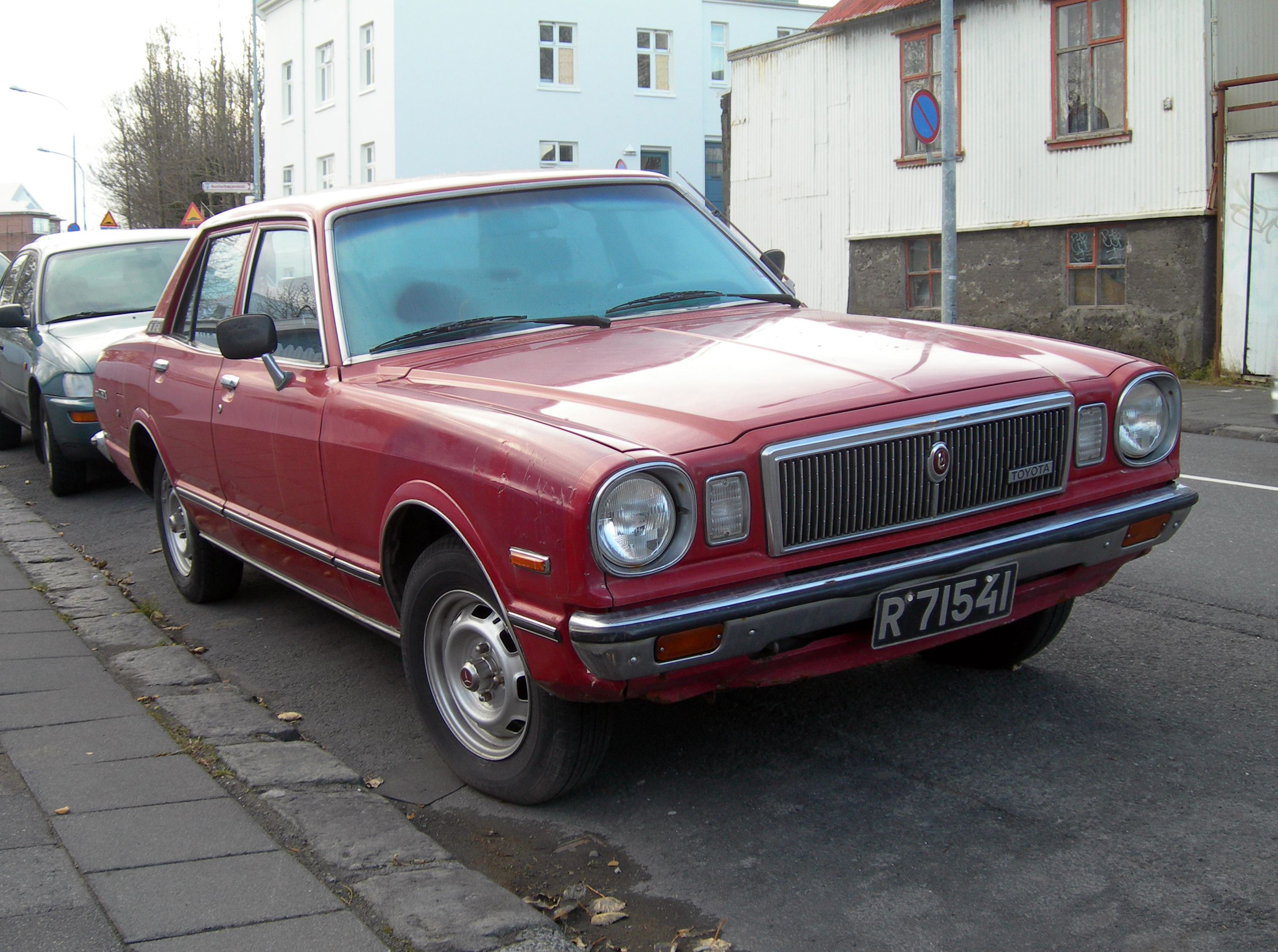 Reykjavik,Oct 2009